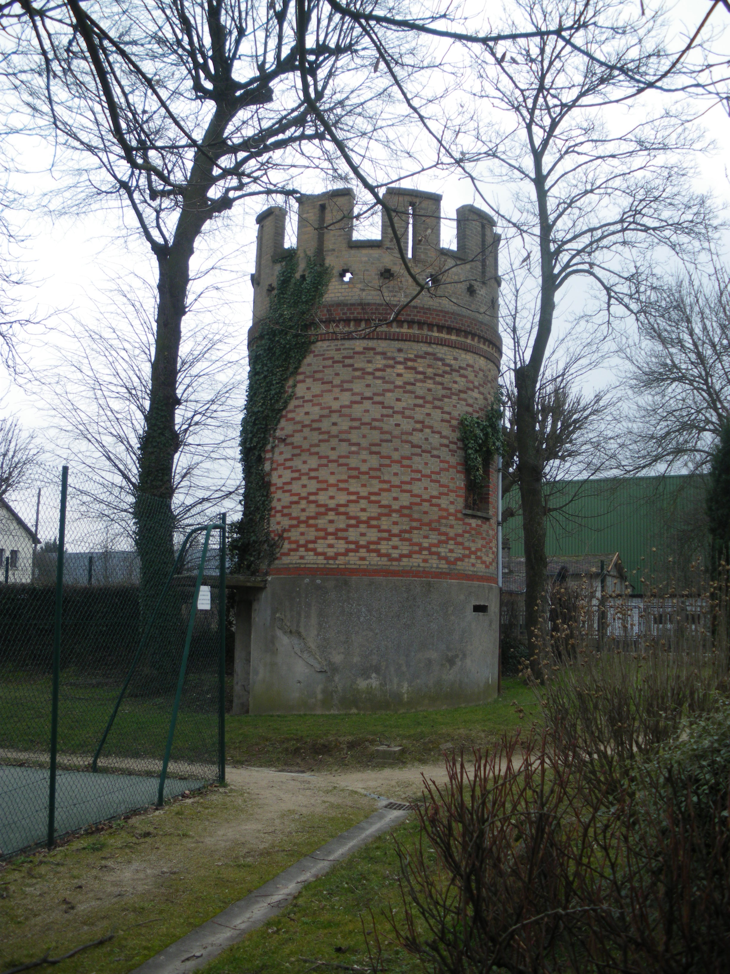 Parc Chateau Gaillard, Wissous, Essonne, France